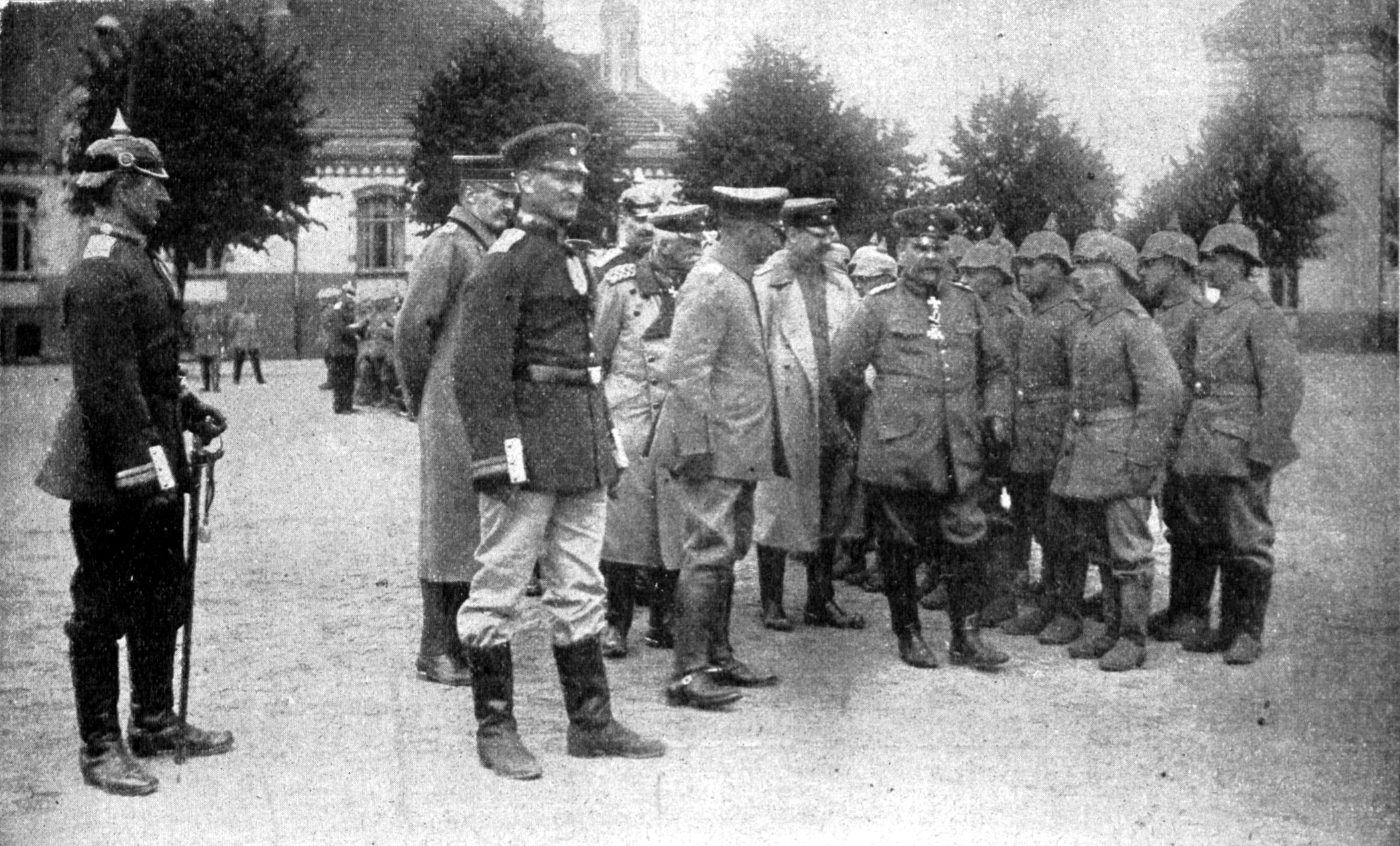 Der stellvertretende kommandierende General des IX. Armeekorps Exzellenz v. Roehl in Lübeck. Oberst v. Kuehnheim steht links während der General abschreitend besichtigt. Neben dem General steht der Generalleutnant Hoppenstedt.